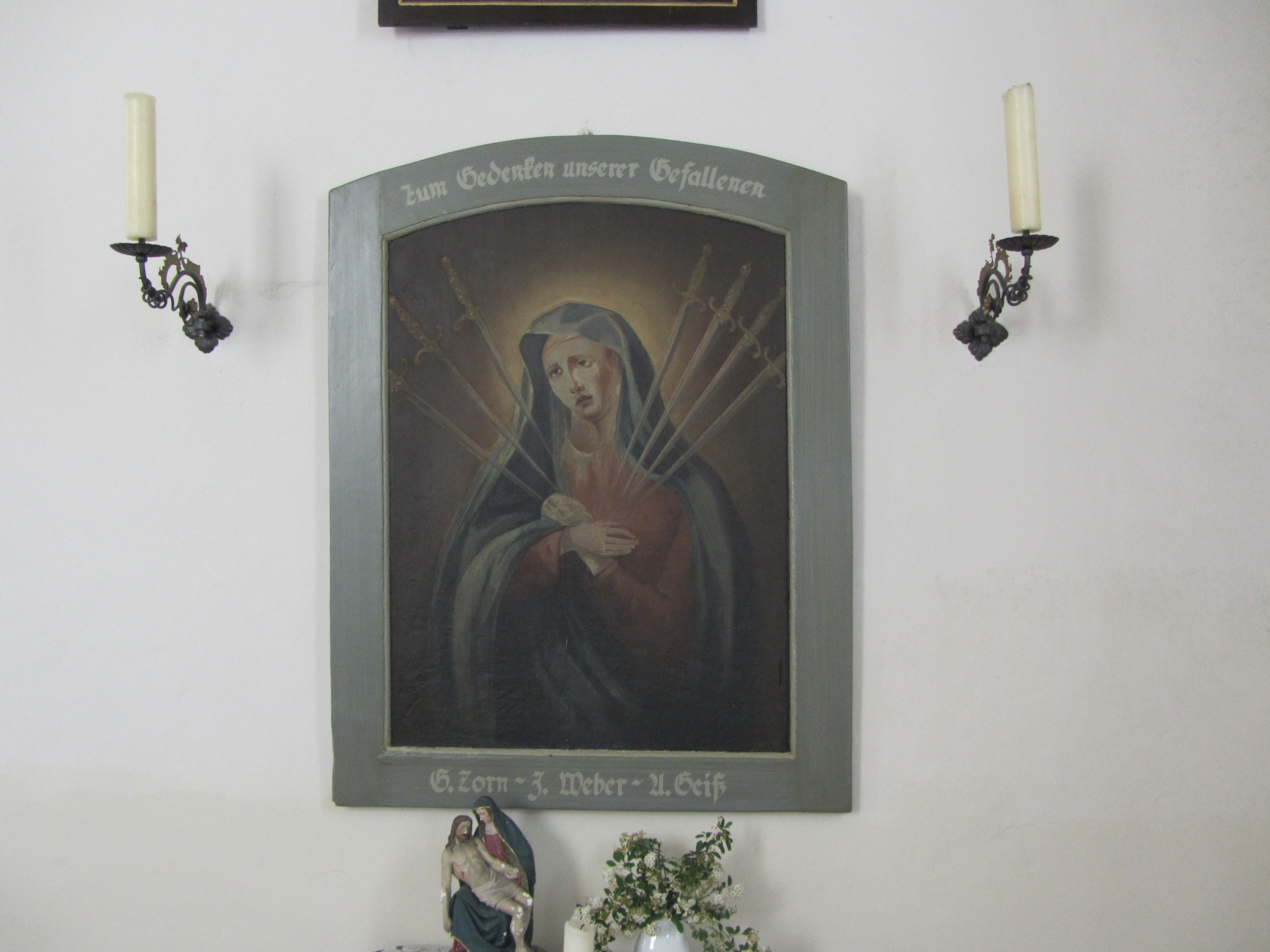 Blasiuskapelle in Briach